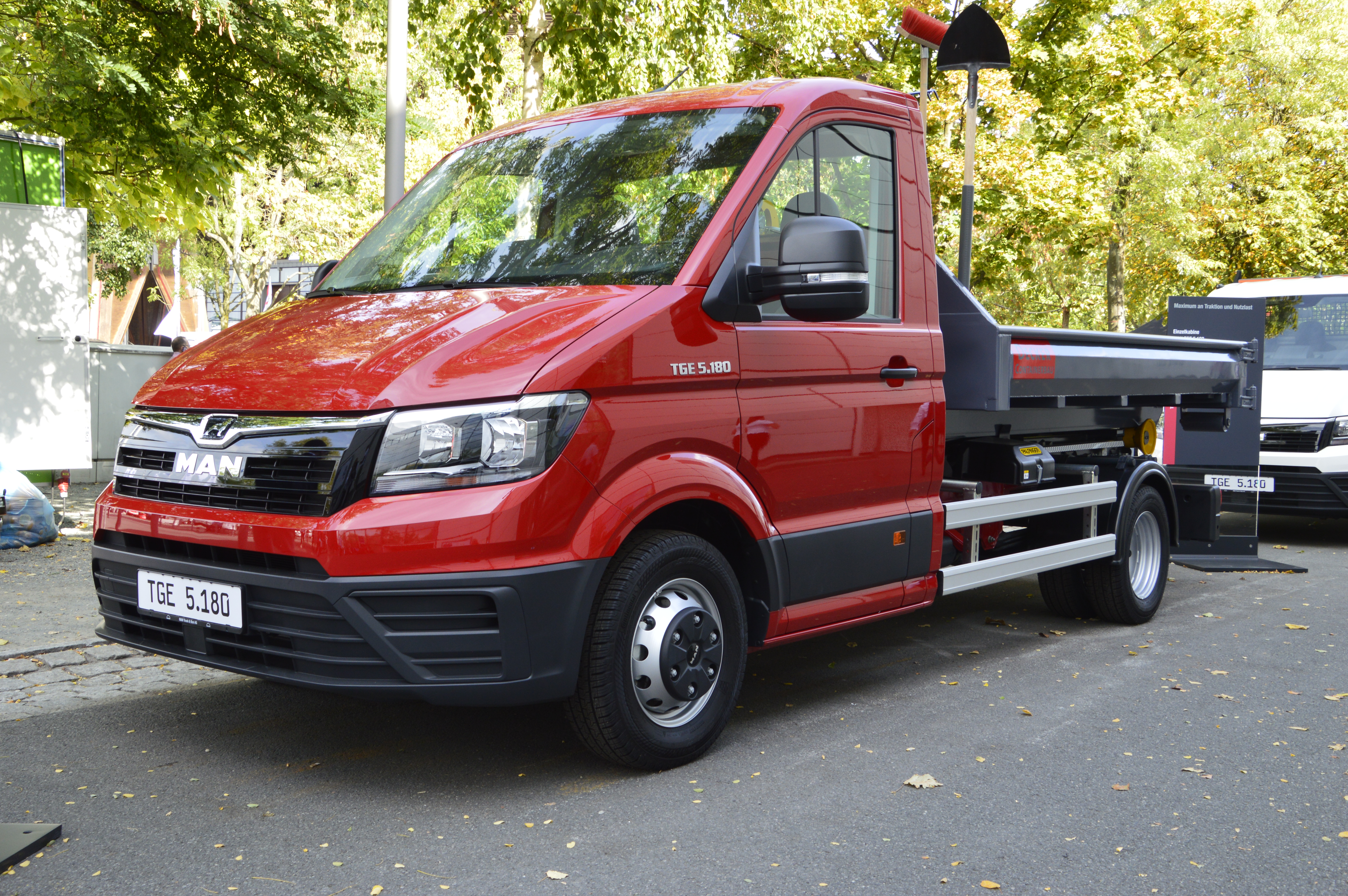 MAN TGE 5.180 Einzelkabine mit Abrollkipper der Fa. Palfinger. Wechselbehälter Fa. Decker. Motor: 2.0 l Biturbodiesel; 4 Zylinder, Heckantrieb. Leistung: 130 kW (177 PS).